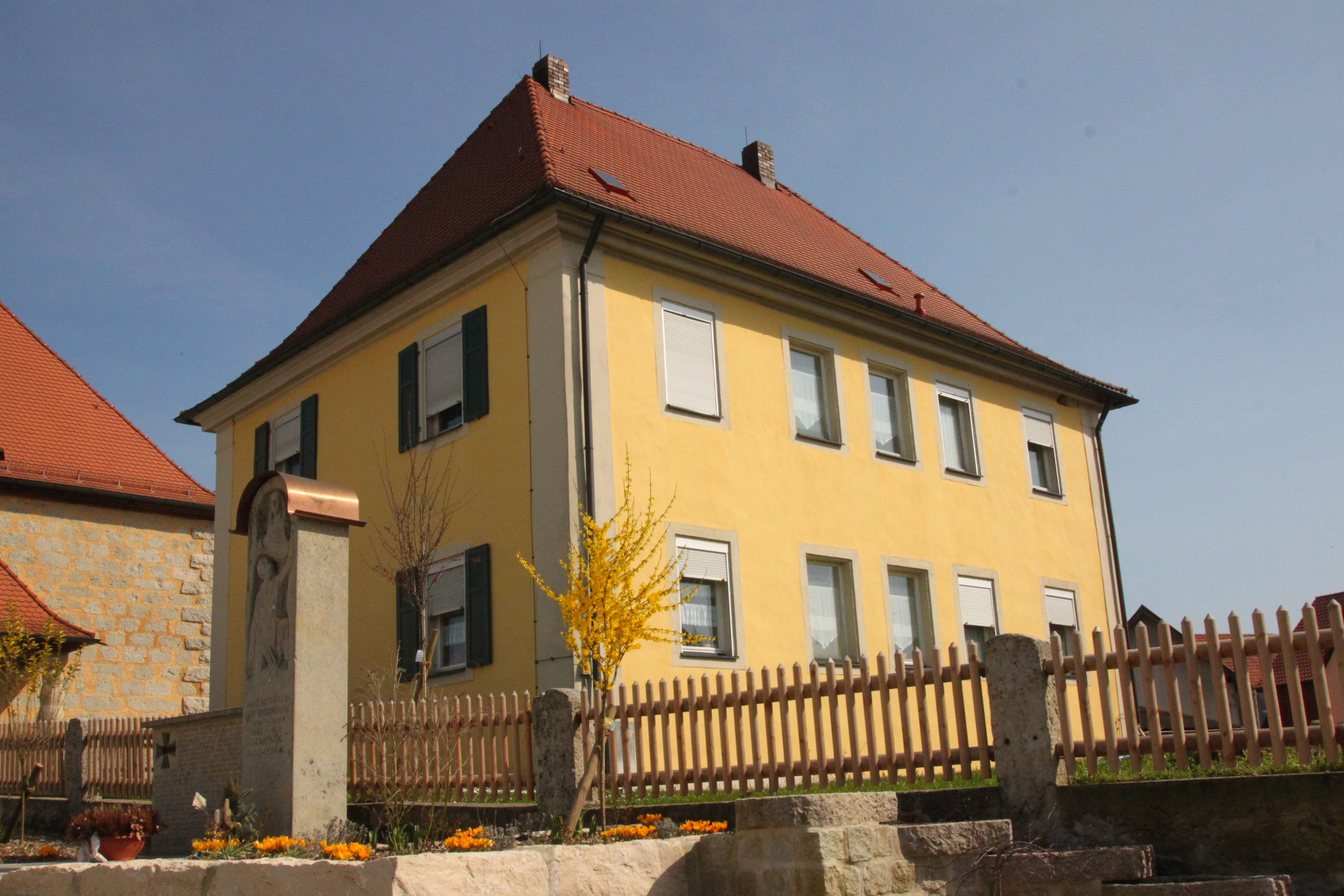 Pfarrhaus, Hochstahl 12, Baudenkmal D-4-72-115-19